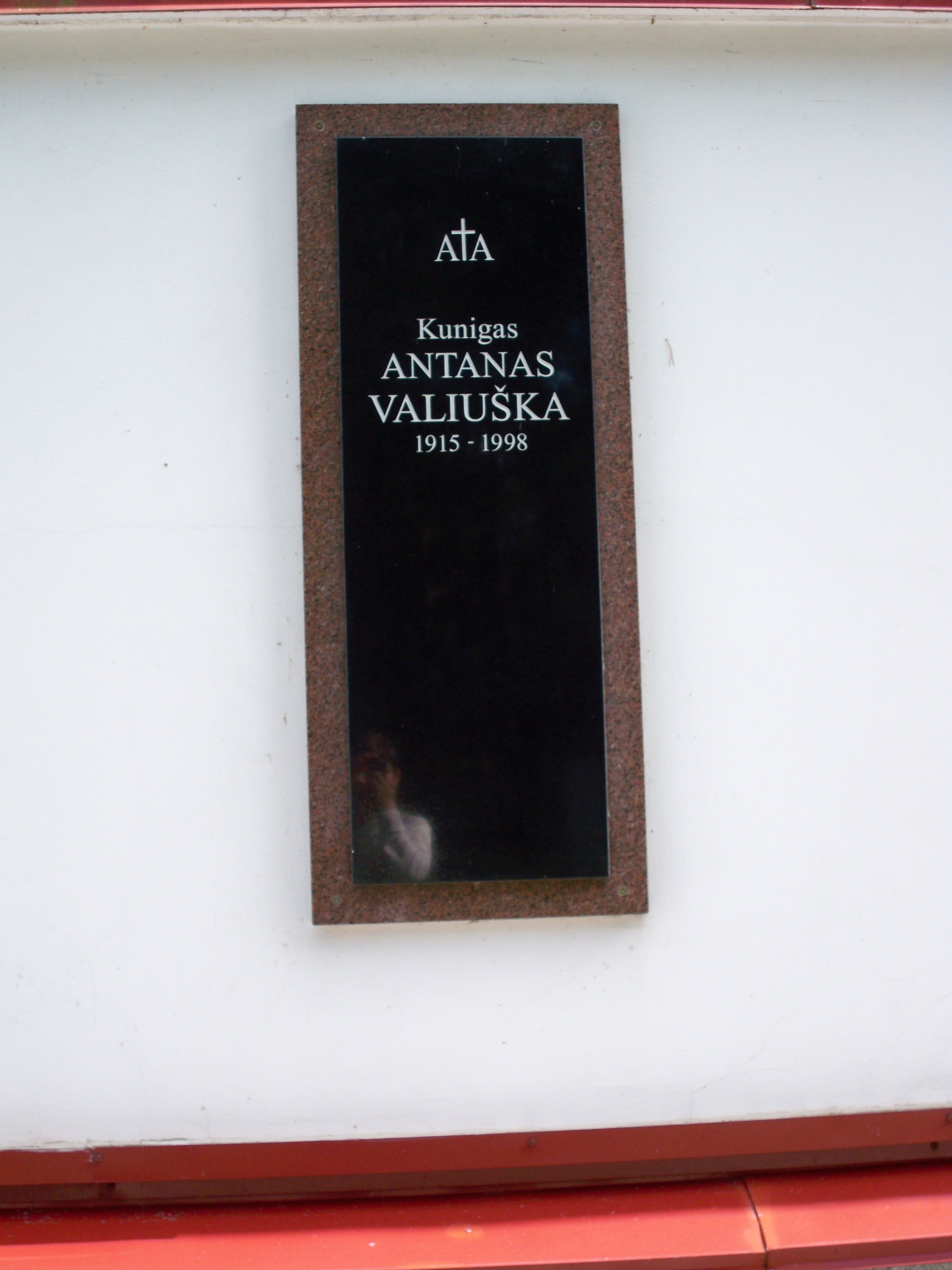 Šventosios bažnyčia, Antano Valiuškos kapas